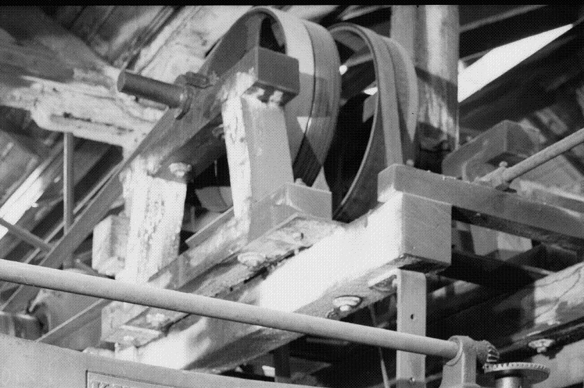 Jackshaft and belt driven machinery.